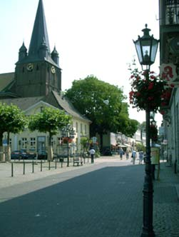 Krefeld, Marktplatz in Uerdingen mit der Pfarrkirche St. Peter, Kirchplatz, Denkmal Nr. 112 This image shows a heritage building in Germany, located in the North Rhine-Westphalian city Krefeld (no. 112).